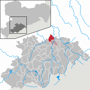 Gornau/Erzgeb. im Erzgebirgskreis, Sachsen